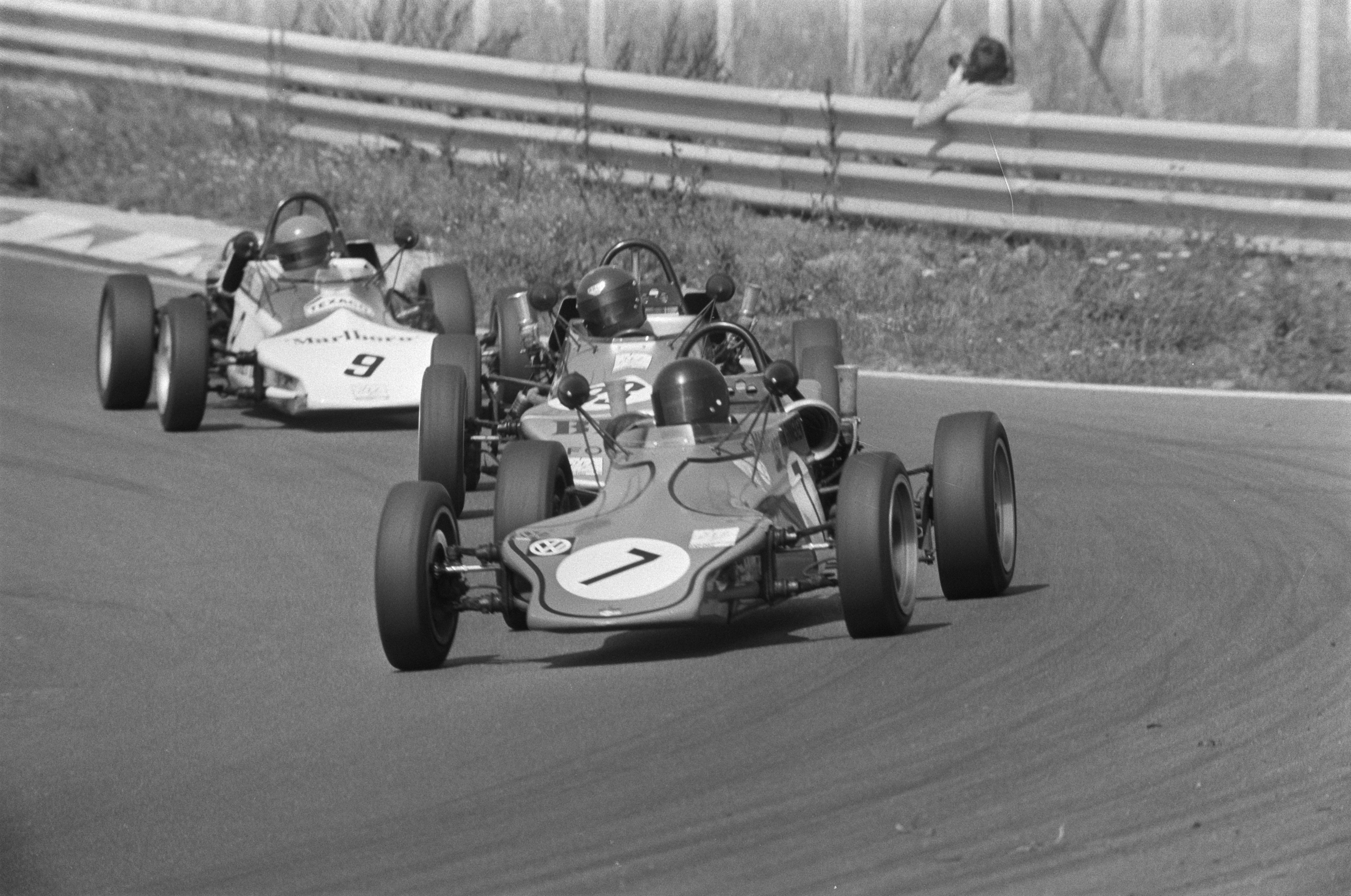 Collectie / Archief : Fotocollectie Anefo Reportage / Serie : [ onbekend ] Beschrijving : Formule Vee 1300 op Zandvoort; Maarten van Ginneken aan kop (7) achter hem Steenbergen (33) en Jelle Hingst (9) Datum : 21 juli 1974 Locatie : Noord-Holland, Zandvoort Trefwoorden : autoraces Persoonsnaam : Jelle Hingst Fotograaf : Mieremet, Rob / Anefo, [onbekend] Auteursrechthebbende : Nationaal Archief Materiaalsoort : Negatief (zwart/wit) Nummer archiefinventaris : bekijk toegang 2.24.01.05 Bestanddeelnummer : 927-3391